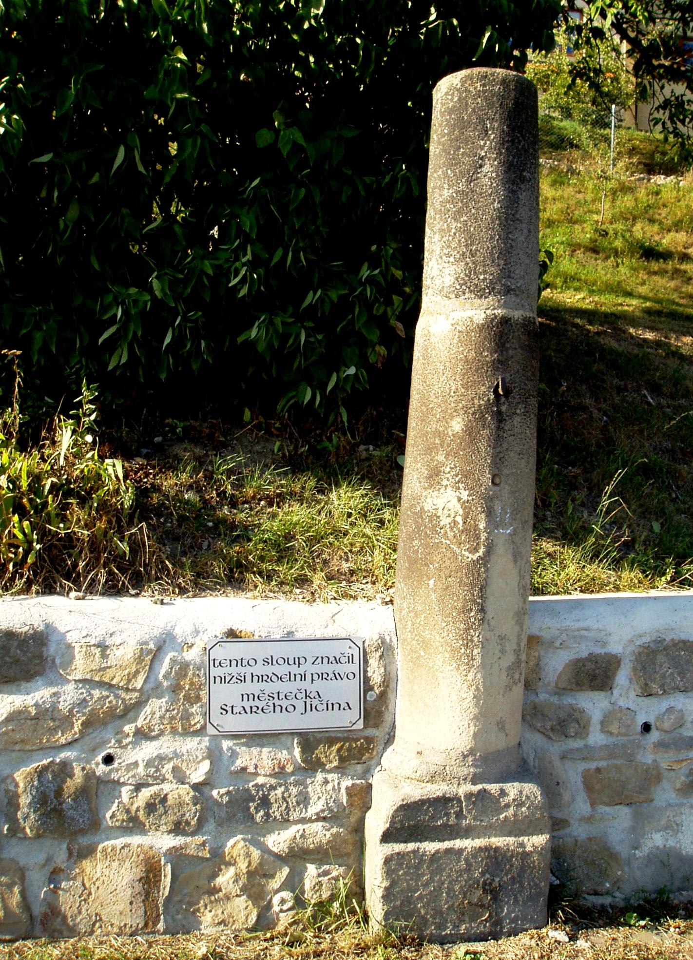 Pranýř (Starý Jičín), pod zahradou domu čp. 72, Starý Jičín